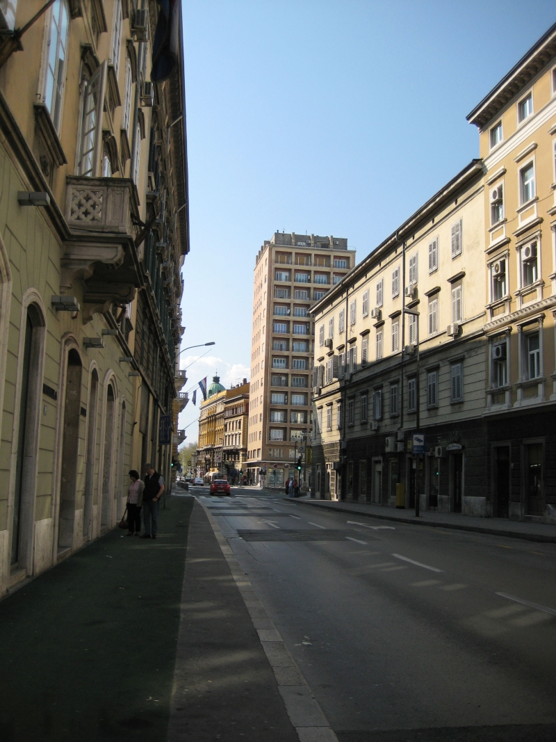 Adamićeva ulica u Rijeci. Pogled na Riječki neboder